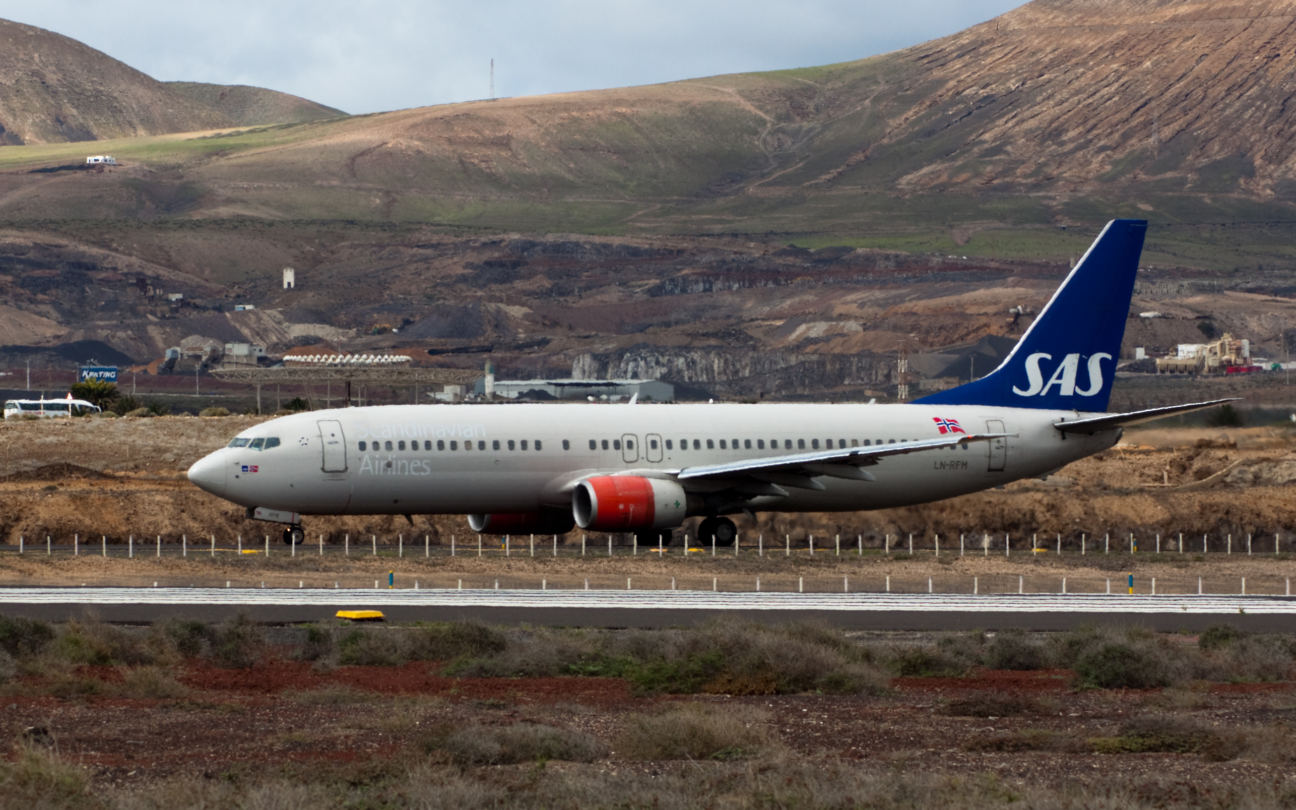 SAS B737-800 LN-RPM